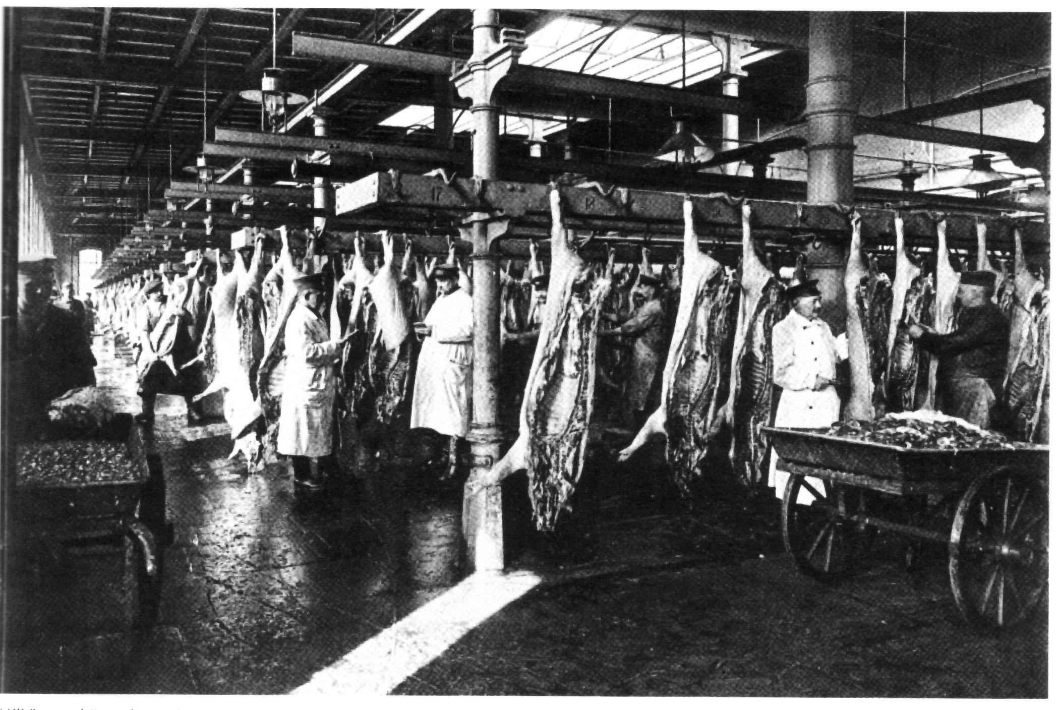 Inspectors of armed forces control meat handling in the slaughterhouse of “Produktion” in Hamburg-Hamm, Wendenstraße. Militärinspektoren kontrollieren die Fleischverarbeitung im Schlachthof der Genossenschaft „Produktion“, Wendenstraße in Hamburg-Hamm.